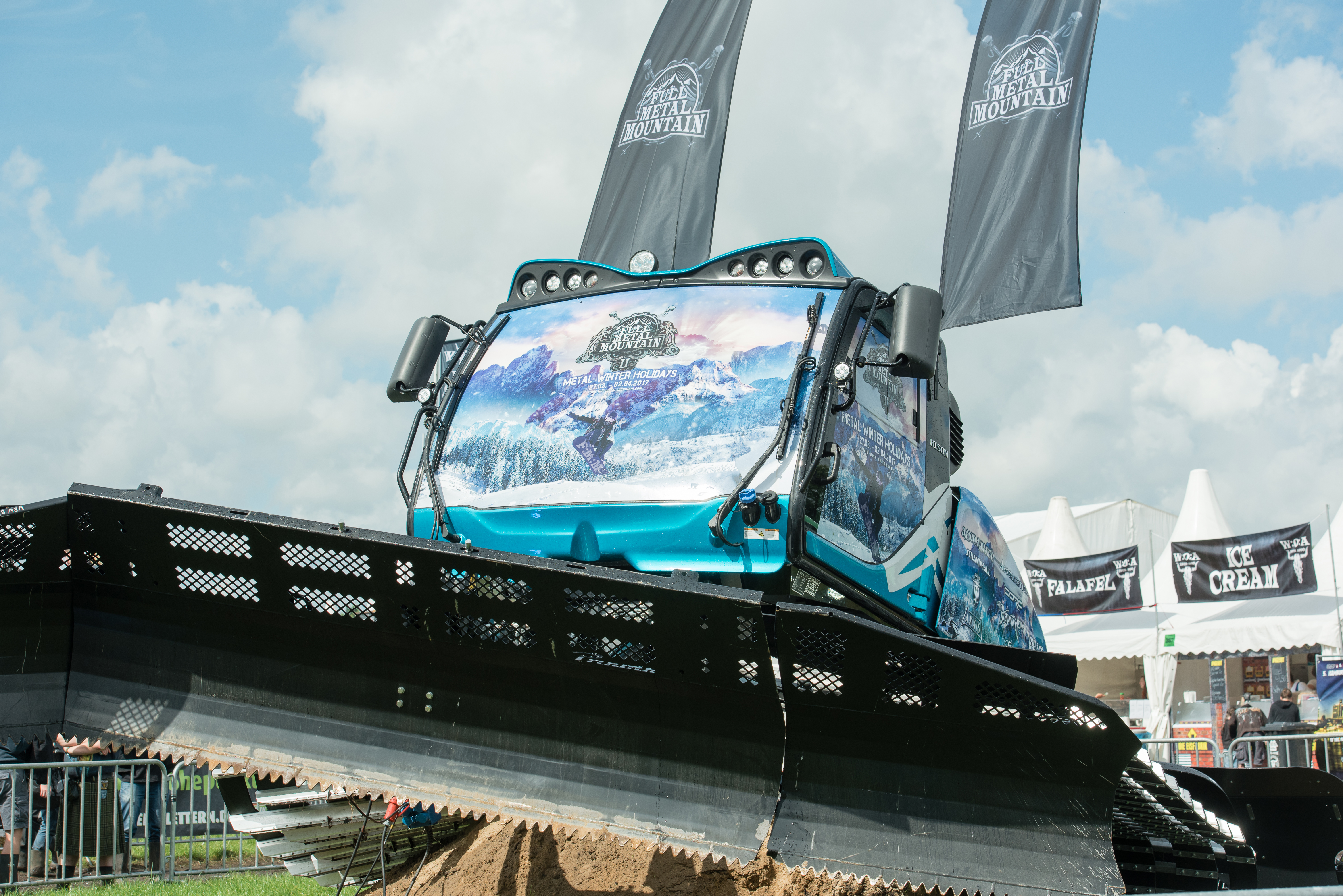 Impressionen vom Wacken Open Air 2016